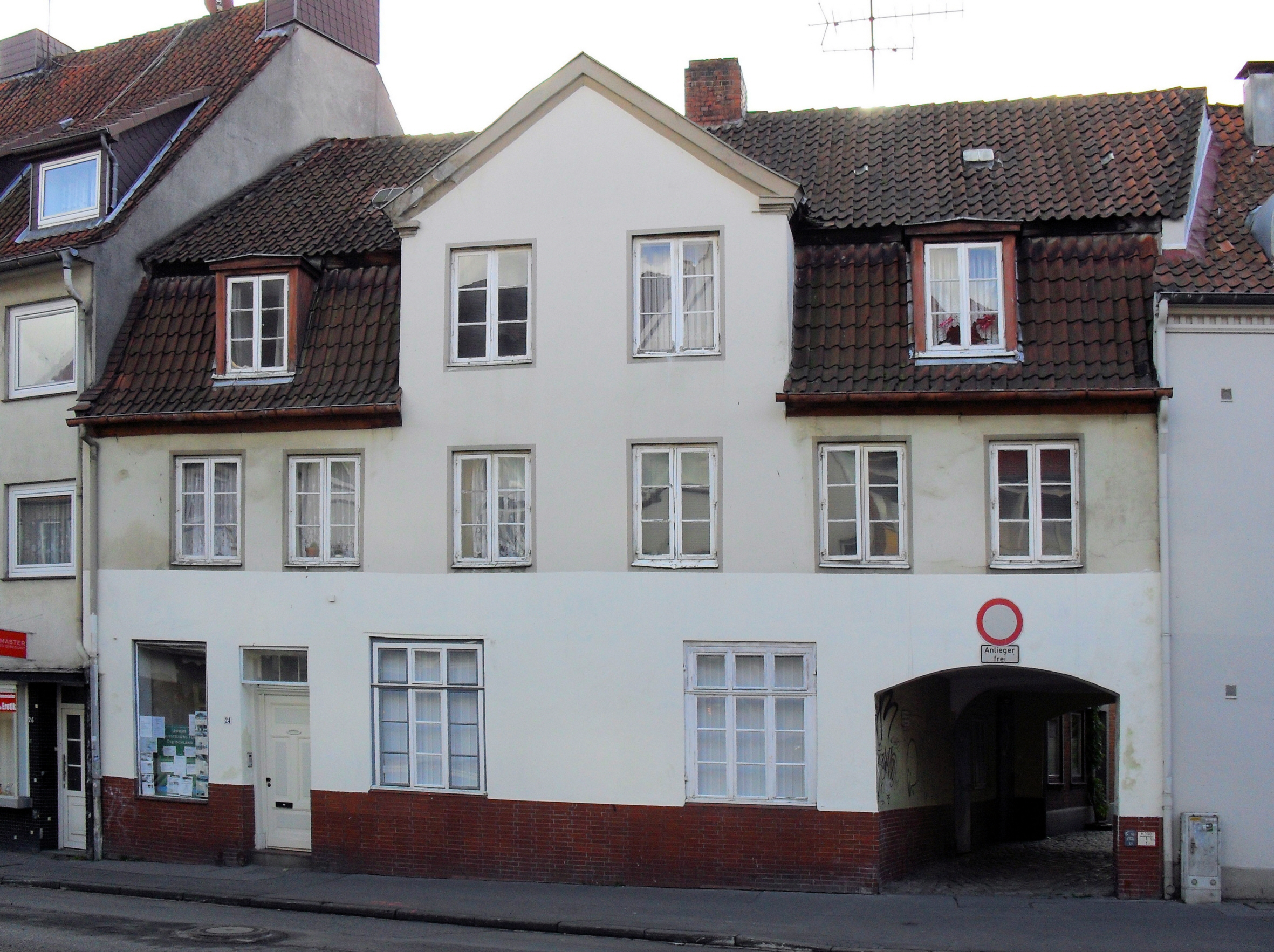 Das Haus Krähenstraße Nr. 24 in Lübeck; rechts der Zugang zur Vereinsstraße